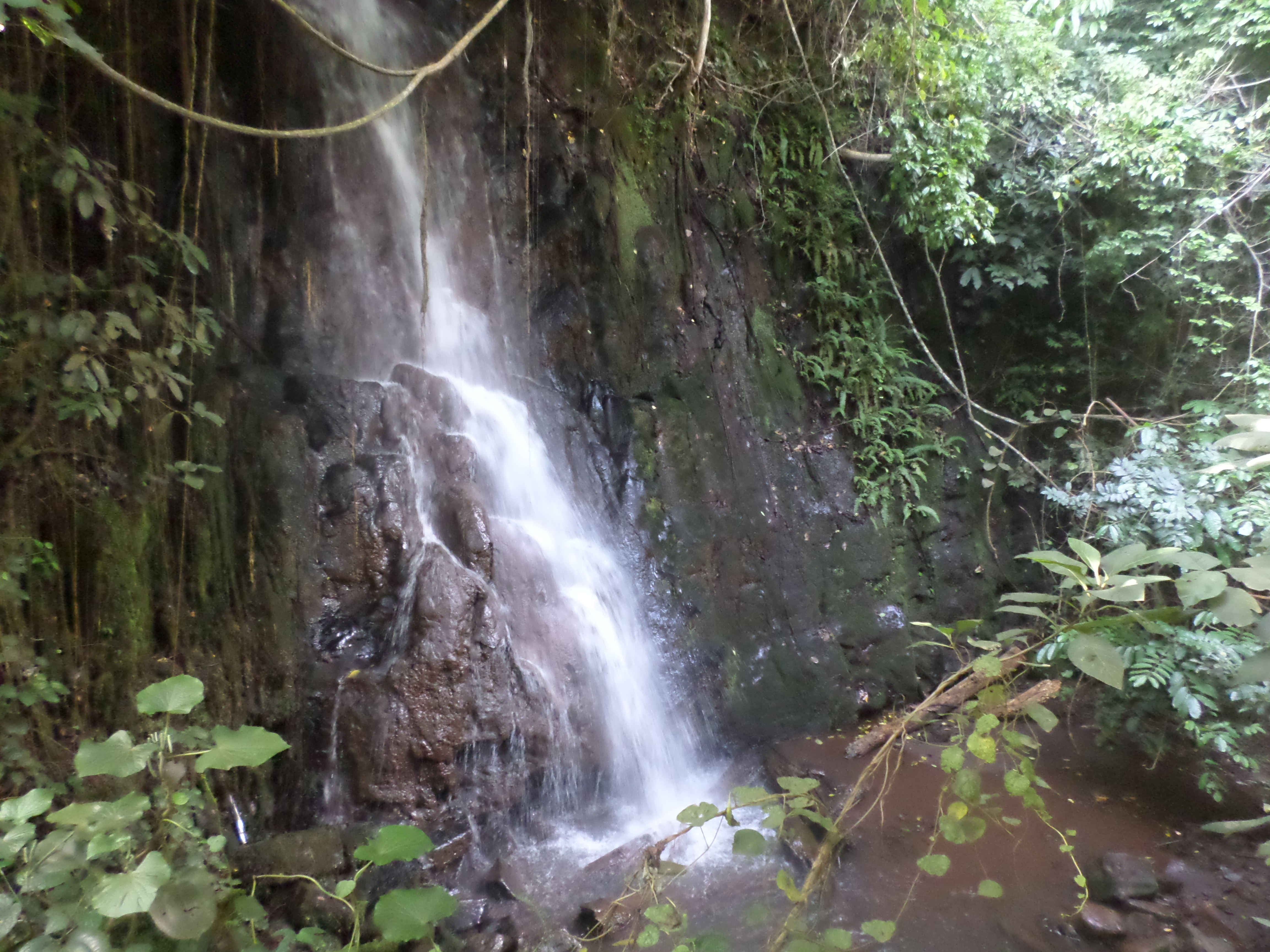 Chute d'eau douce sur la rivière bouche forte en traduction littéraire (choüo tchìt)